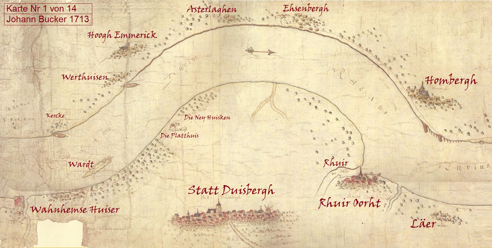 Bucker-Karte Nr. 1 von 14 - Rheinverlauf bei Duisburg